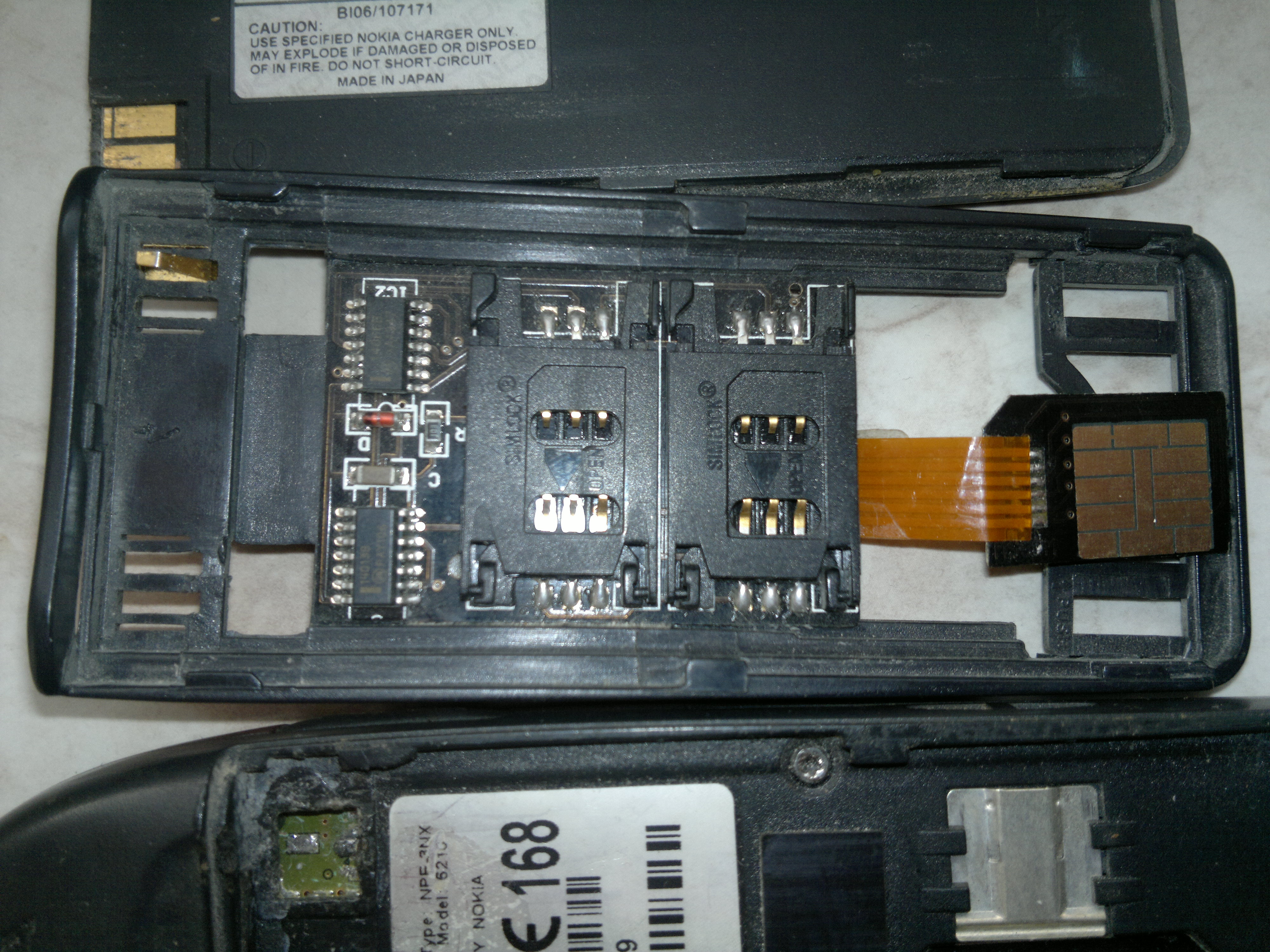 Nokia 6210 Dual Sim Adapter. (es Fehlen am Adapter selbst 3 Kontaktstifte für die Übertragung vom Akku zum Gerät). Am Gerät selbst wurden durch das Fehlen von 2 Kontaktstifen am Adapter beim Entfernen des Adapters 2 Kontaktstife des Geräts mit heraus gerissen, wordurch das Gerät unbrauchbar wurde. Der im Bild Sichtbare Stift im Adapter wurde von mir Nachträglich (vor Bilderstellung)wieder eingefügt. In der Mitte des Adapter ist die Platine mit Elektronik und 2 Mini SIM Plätzen zu erkennen. Rechts am Braunen Flexkabel ist die Leiterplatte in Mini SIM Format zu sehen welche in den SIM Karten Halter des Geräts geschoben wird.